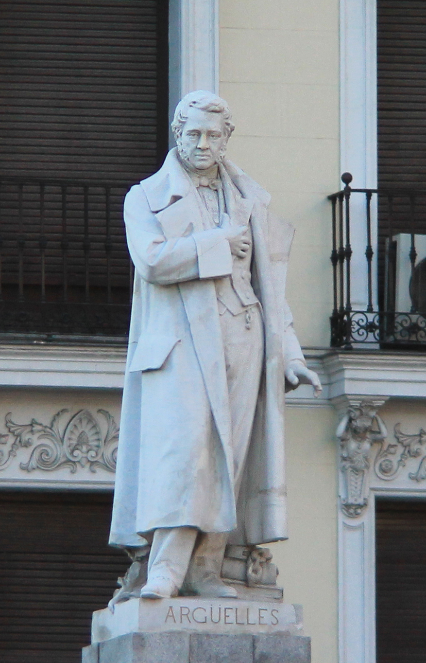 Statue of Agustín Argüelles